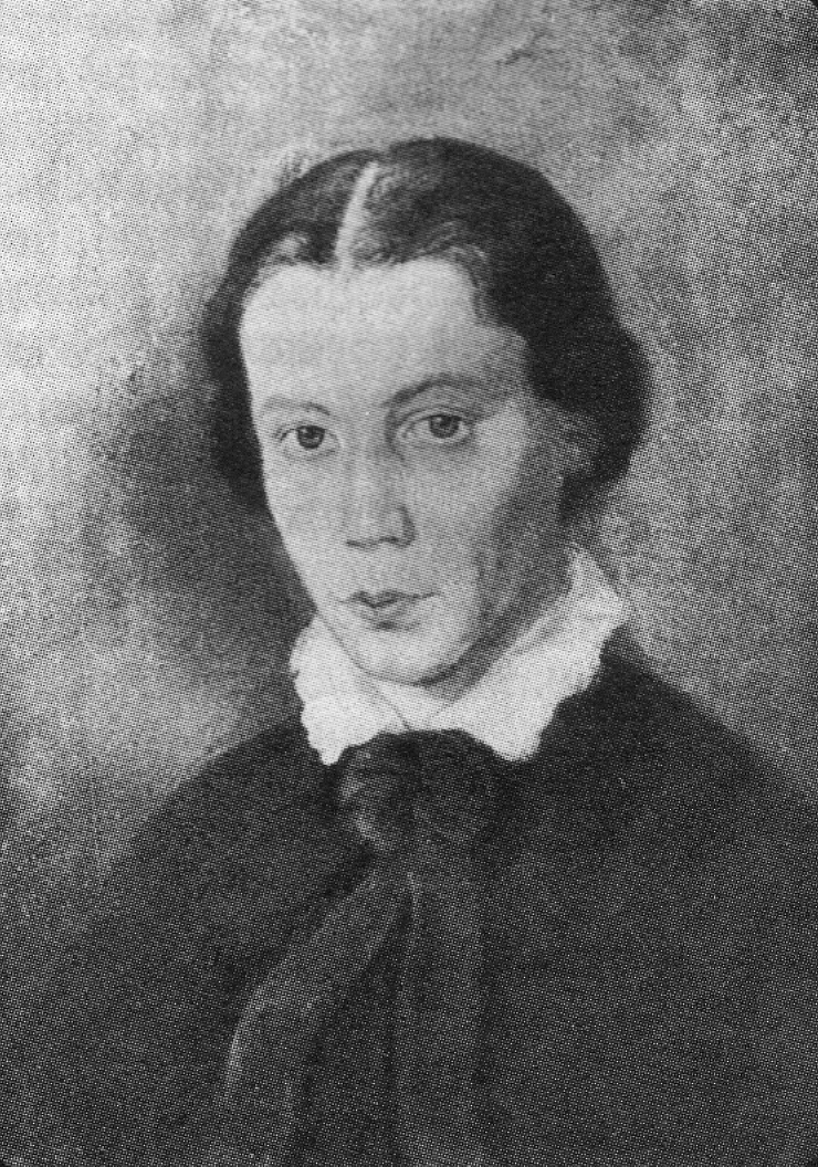 Бакунина Татьяна Александровна